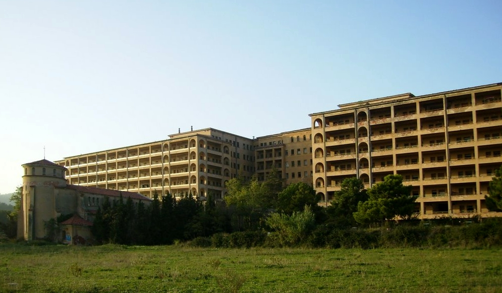 Antiguo Hospital del Tórax de Terrassa, actual Parque Audiovisual de Cataluña.